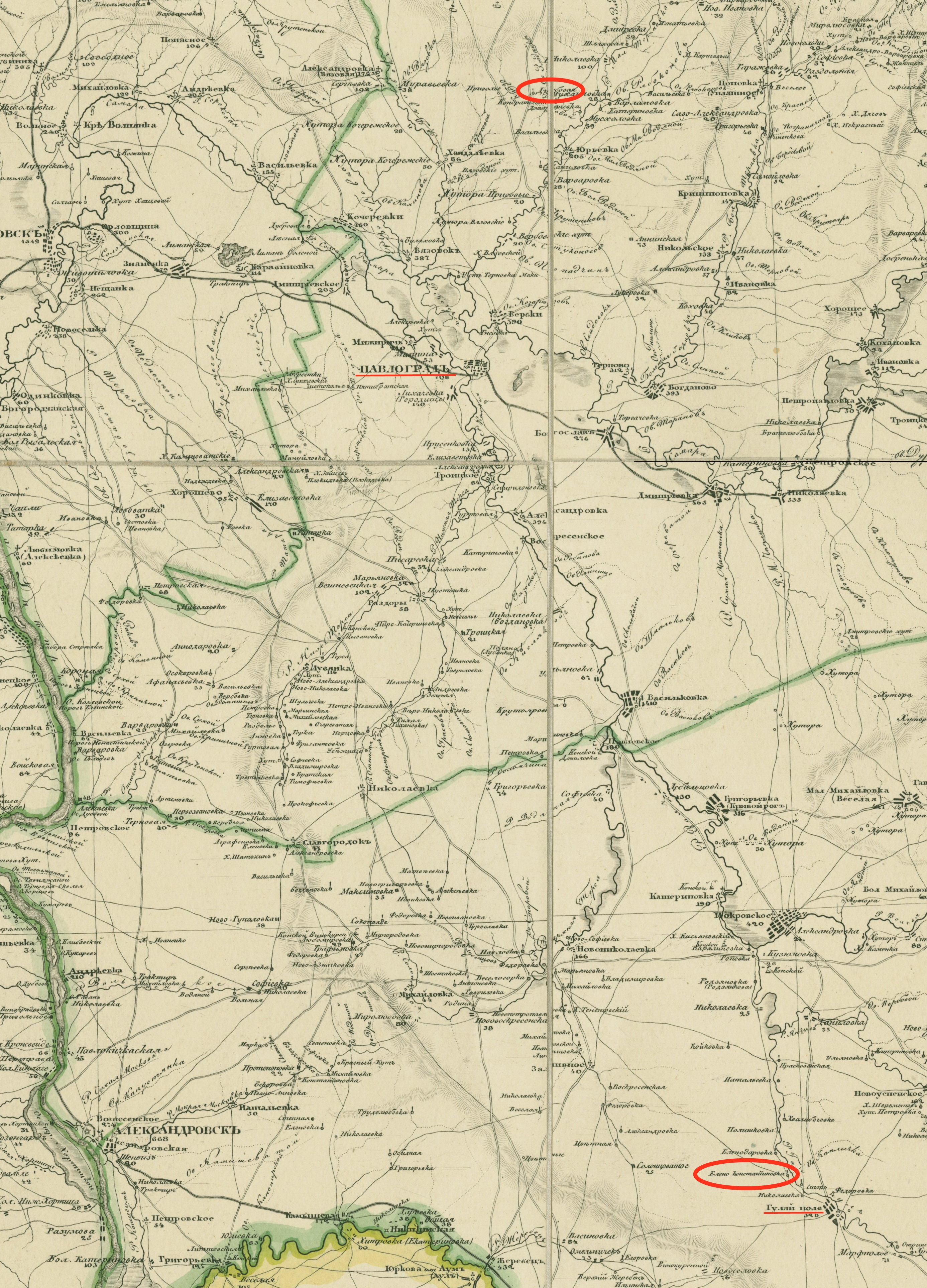 населені пункти, в яких є коріння родини Михненків-Махно